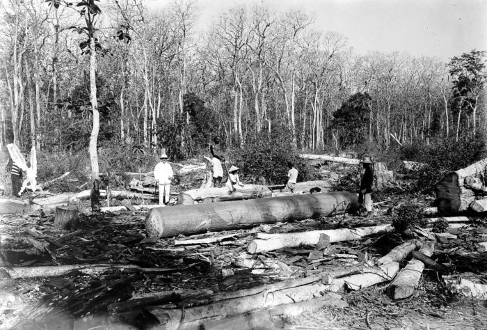 Repronegatief. Djatibosbedrijf in het perceel Blorong, Java